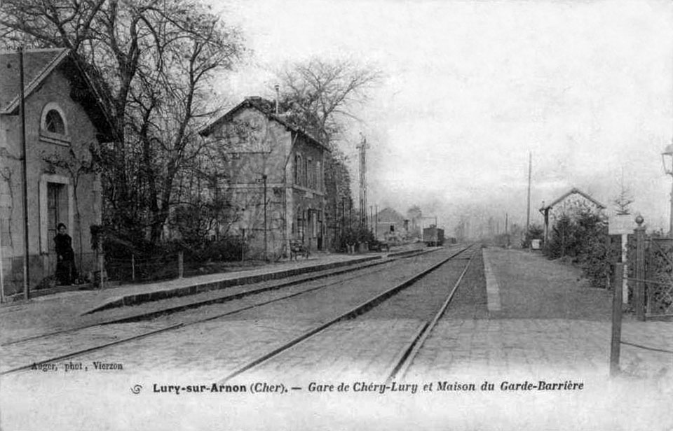 L'intérieur de la gare de Chéry - Lery, avec les voies, le bâtiment voyageurs et au premier plan le passage à niveau et la maison du garde barrière.